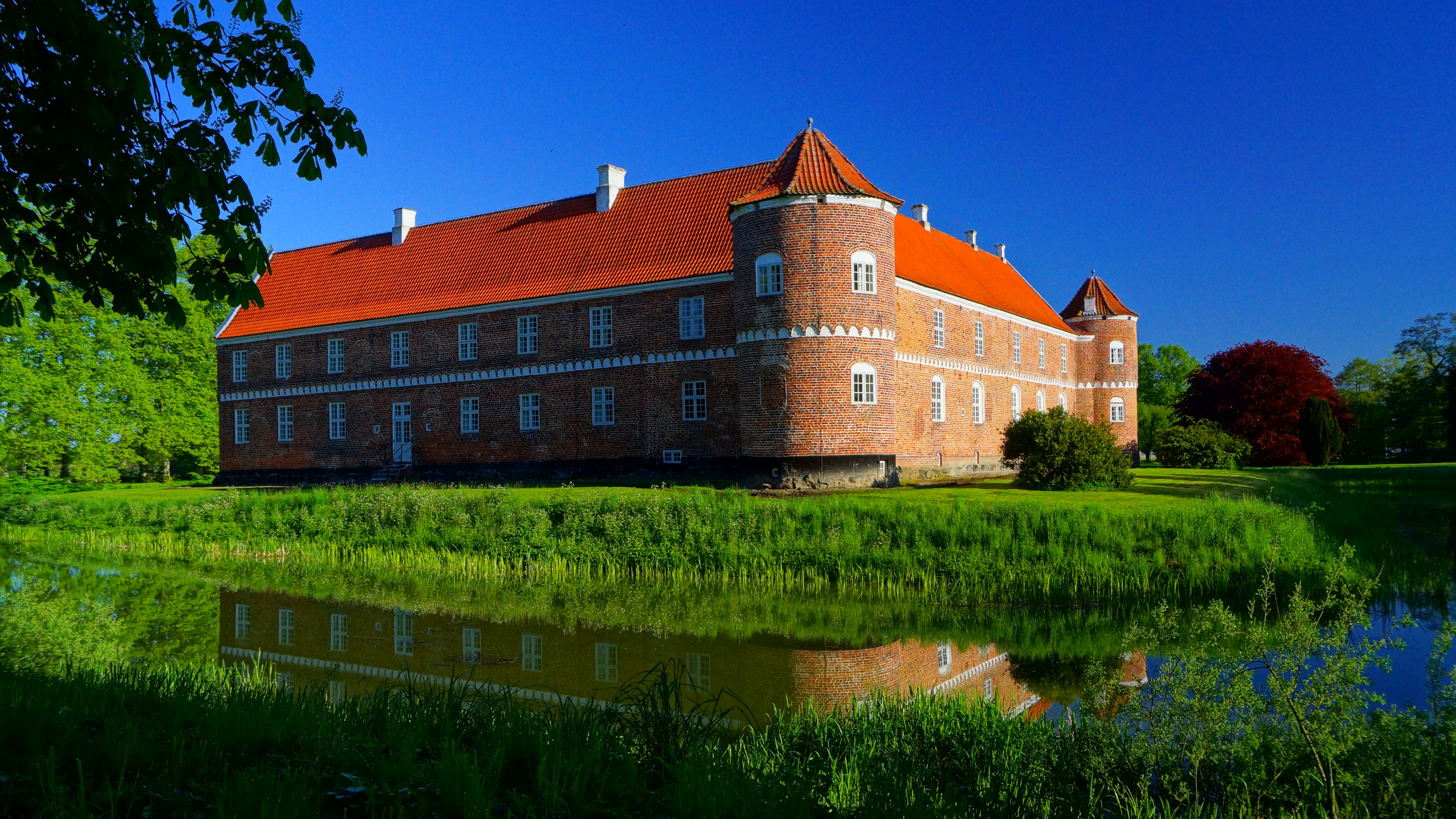 Løvenhom Slot, Djursland, Denmark